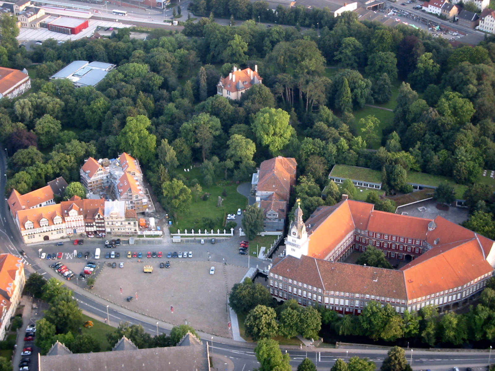 Schloss Wolfenbüttel